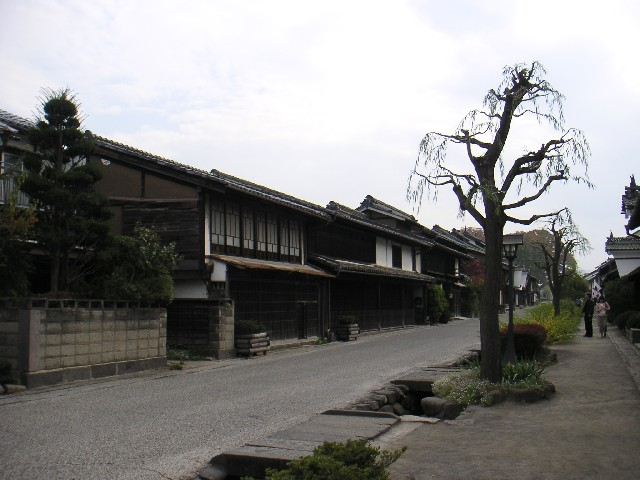 北国街道・海野宿（長野県東御市） 撮影者：Ans 2005.11.03